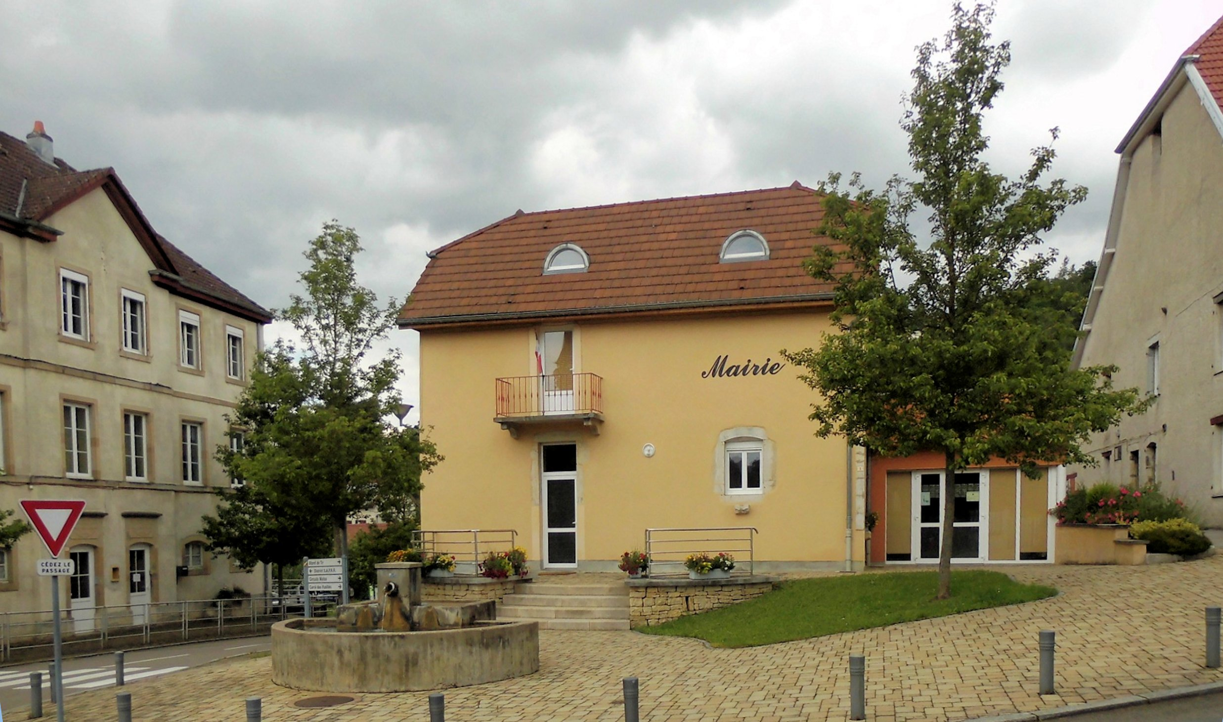 La mairie de Villars-sous-Écot